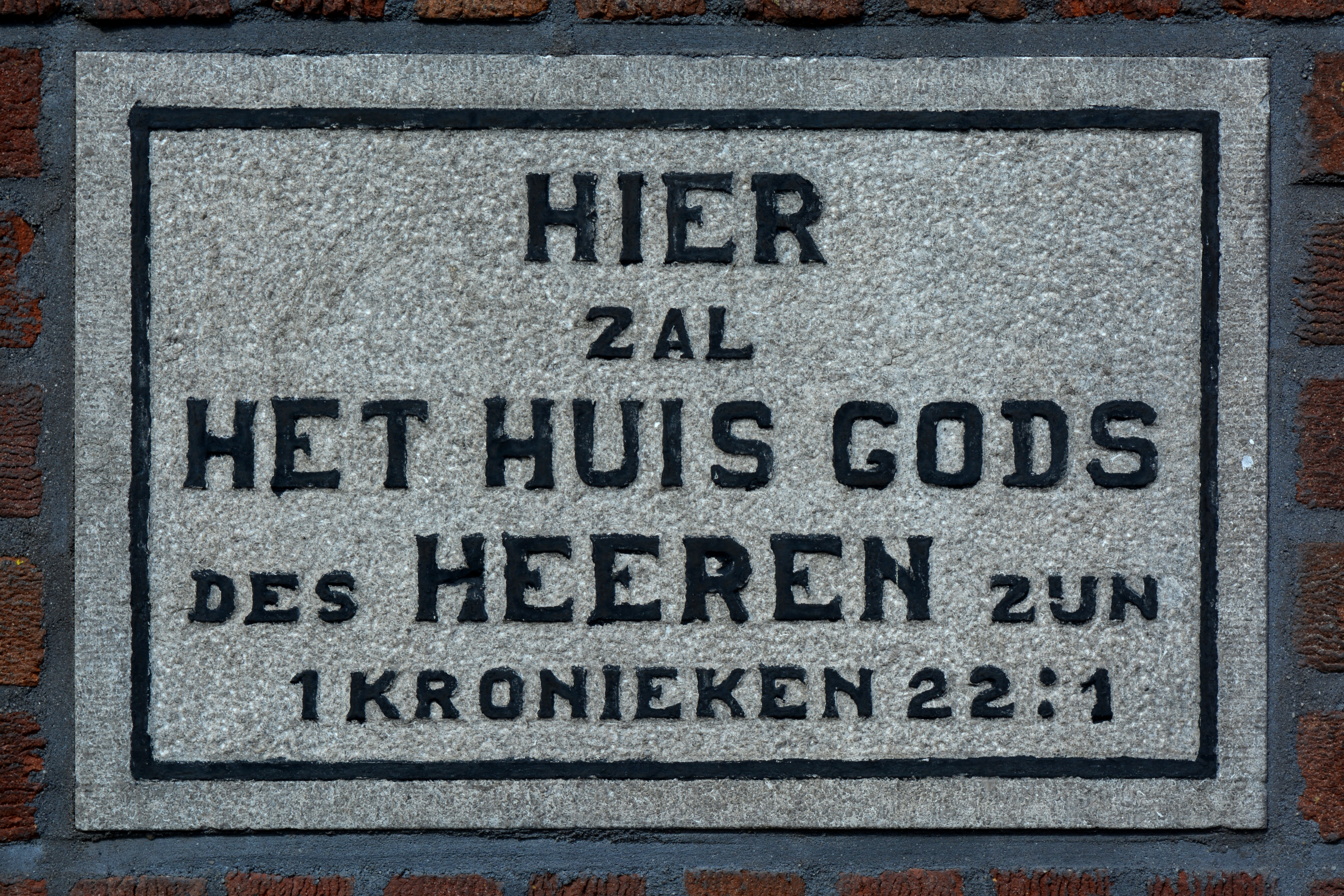 Gideontsjerke, Sint Anne, gevelstien